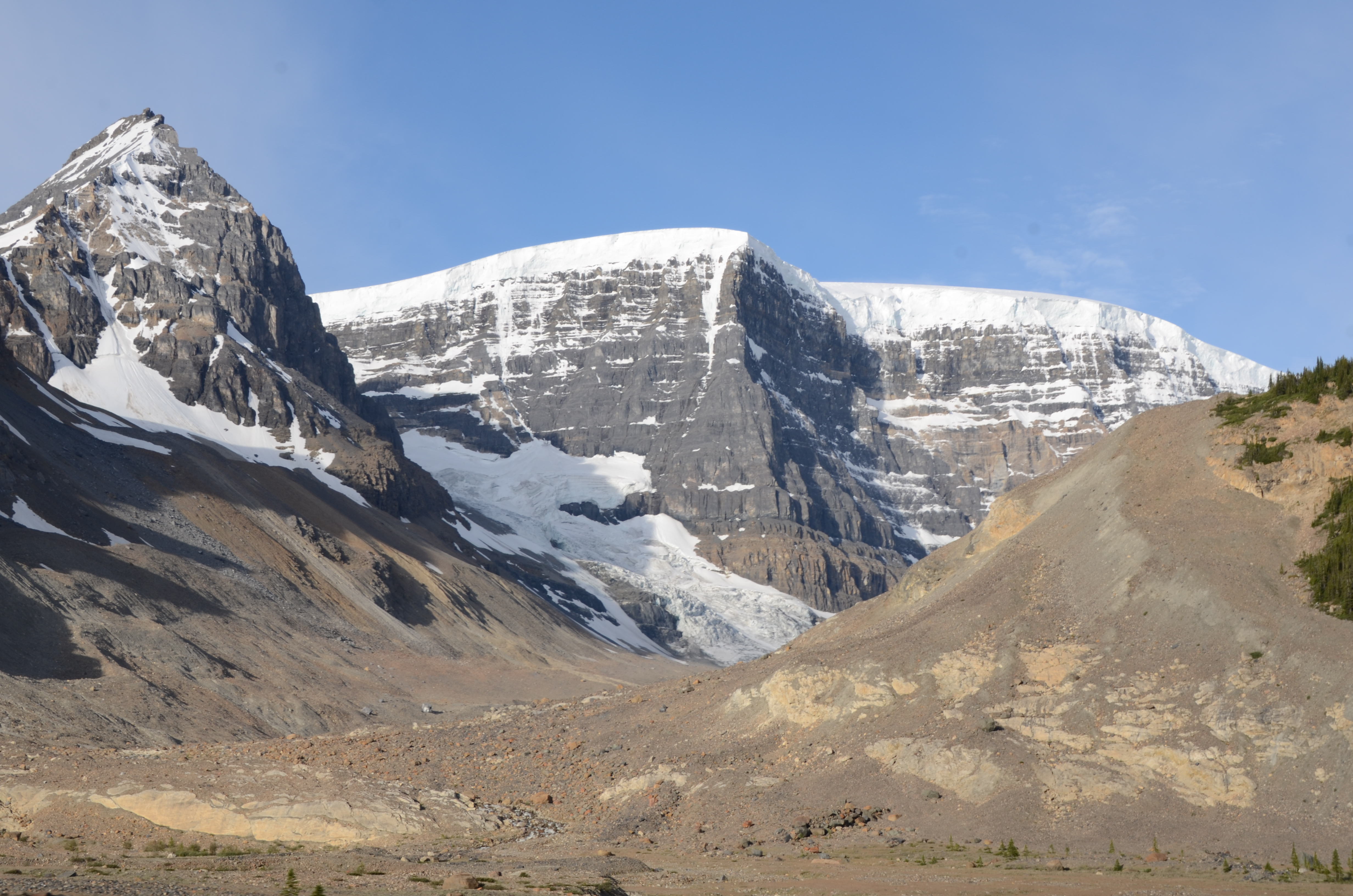 Columbia Icefields